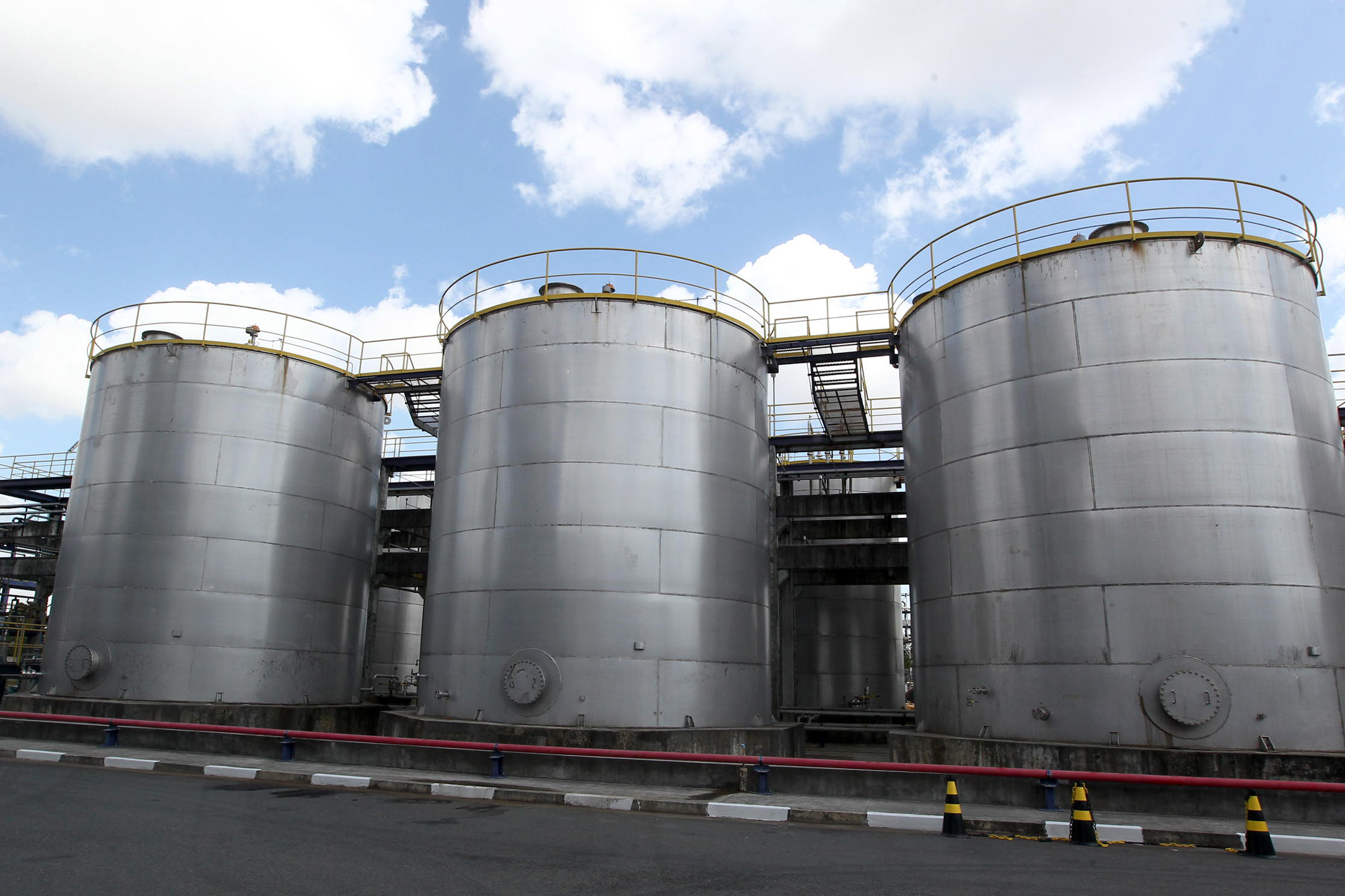 Governador Jaques Wagner participa da inauguração da Unidade de Hidrogênio da Peroxy Bahia, no Polo Petroquímico de Camaçari. Foto Manu Dias/ SECOM